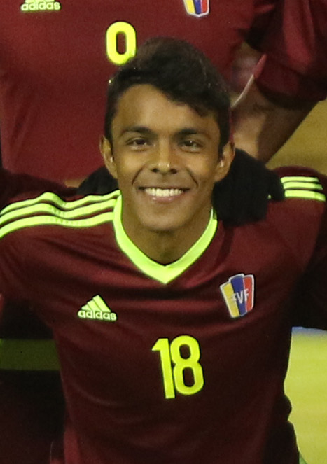 Quito, 2 feb (Andes).- La selección juvenil de Venezuela goleó 4-2 este jueves a su par de Ecuador, que comprometió seriamente sus opciones de clasificar al Campeonato Mundial Sub 20 Corea del Sur 2017, que se desarrollará en mayo próximo. ANDES/Micaela Ayala V.